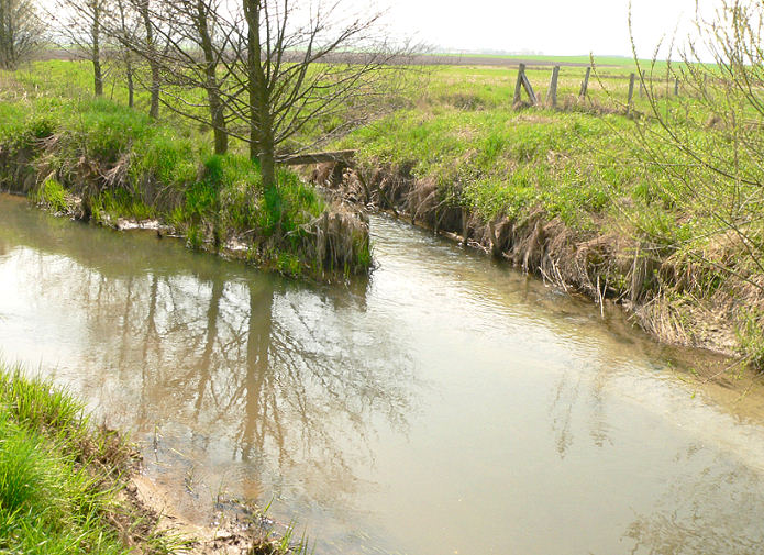 Mündung der kleinen Lutter in die größere Schunter